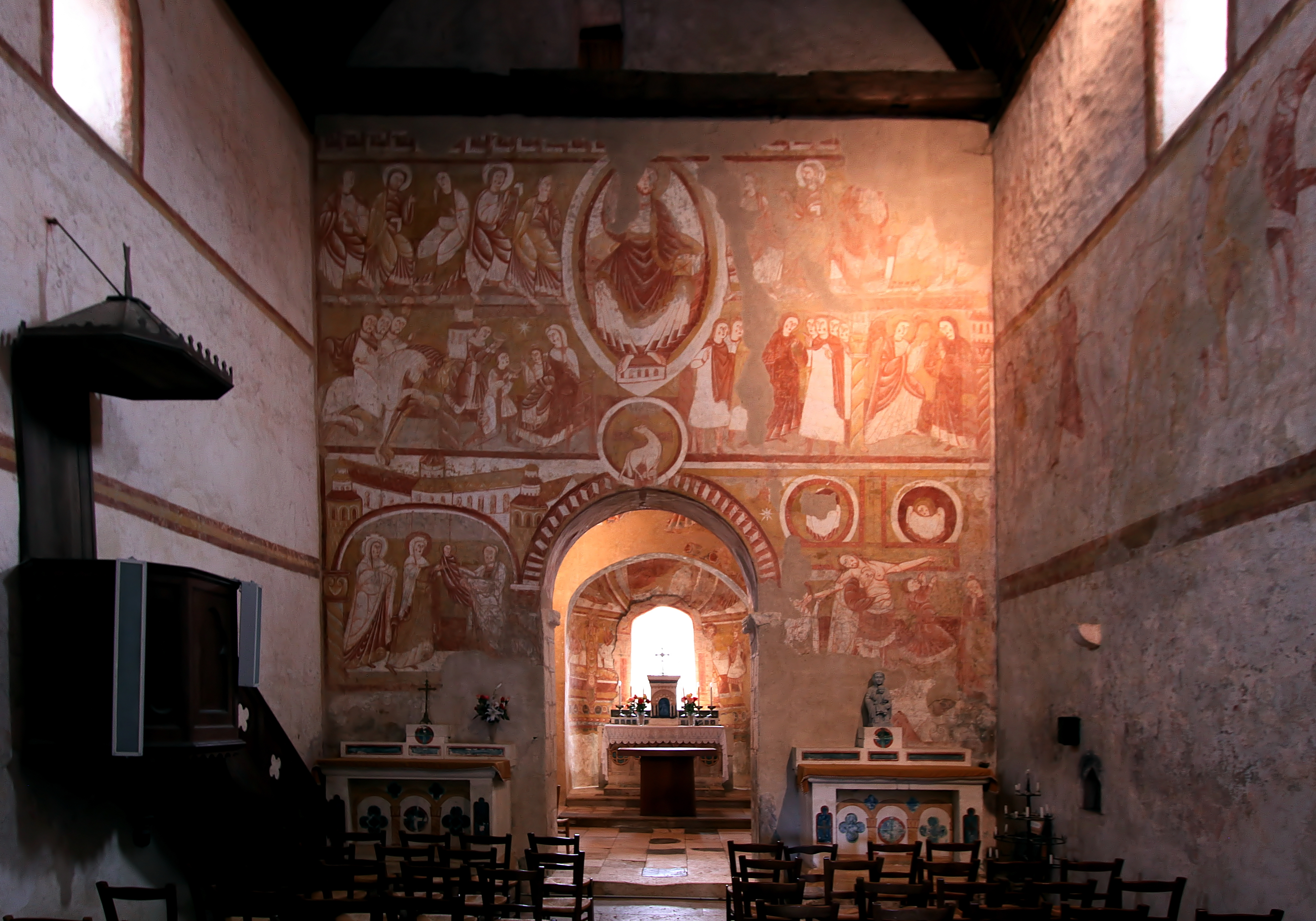 Ortsteil Vic in der Gemeinde Nohant-Vic im französischen Département Indre - Pfarrkirche Saint-Martin, Fresken an der Stirnseite des Langhauses